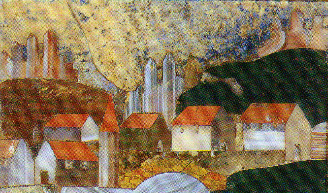 San_lorenzo_brescia_vedutine3.jpg